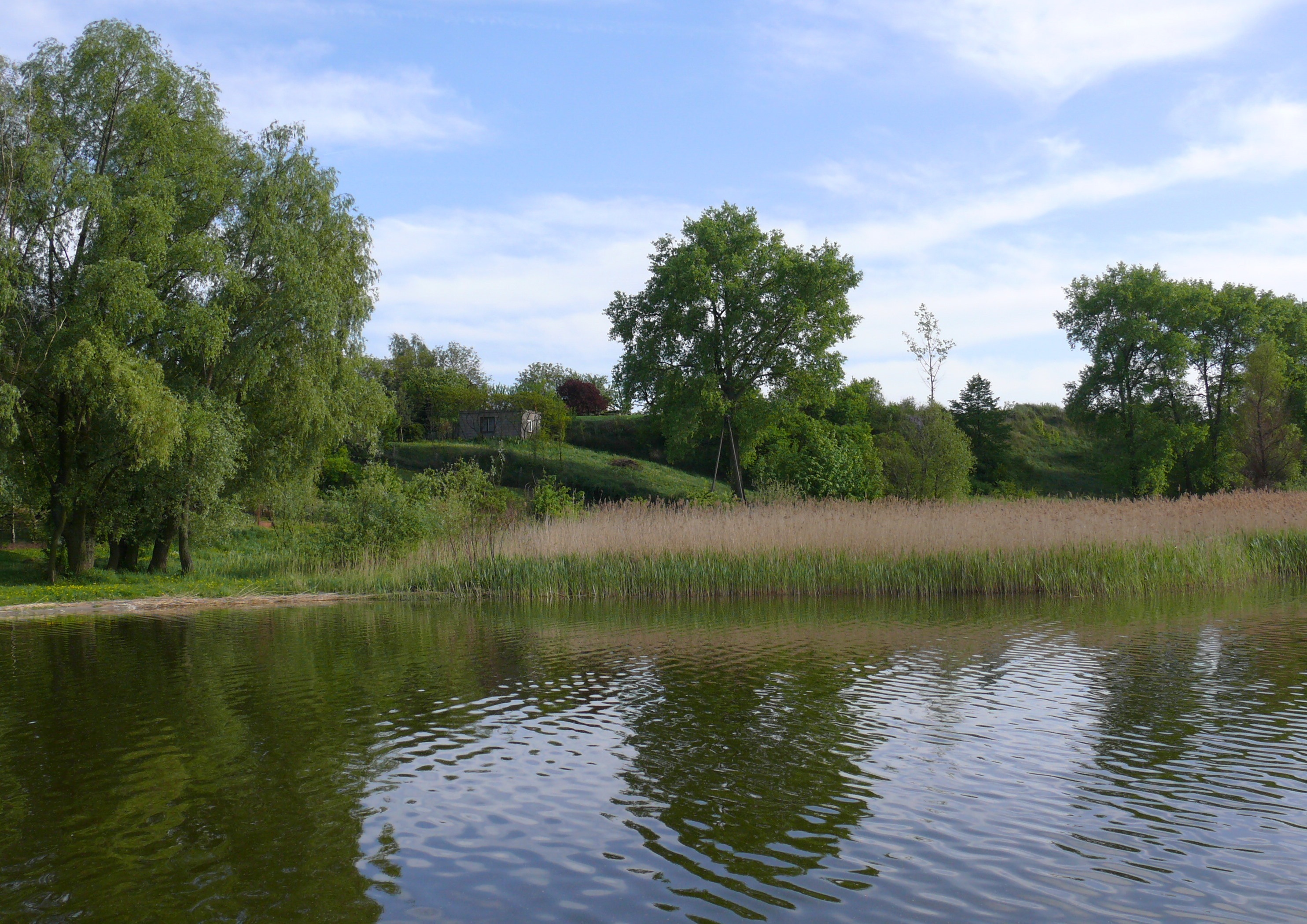 Jezioro Brdowskie (Pojezierze Kujawskie)